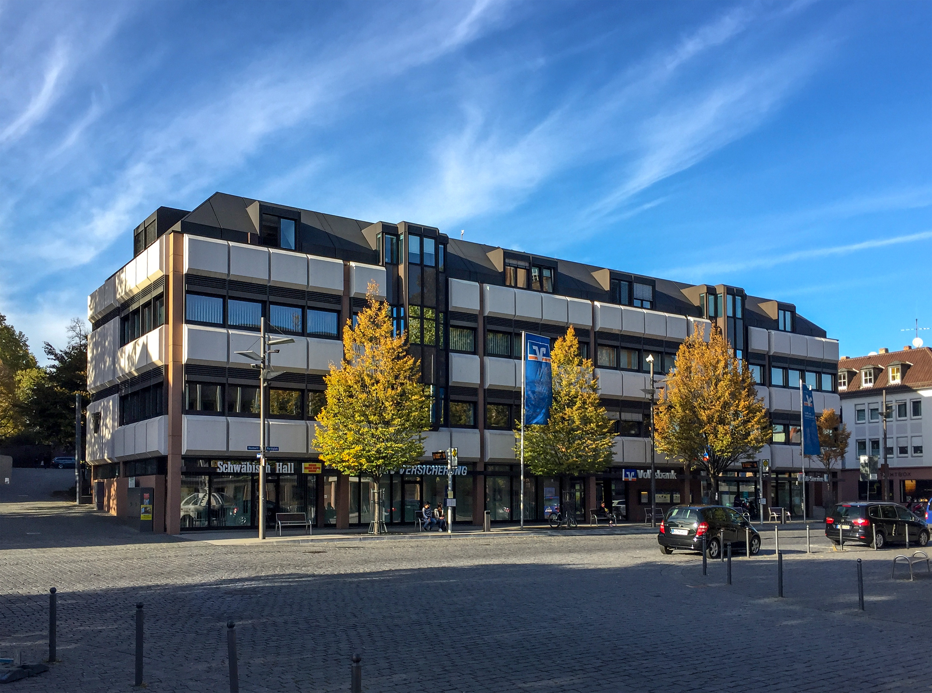 Das Gebäude der Volksbank Alzey-Worms liegt direkt gegenüber der Dreifaltigkeitskirche am Marktplatz in Worms.